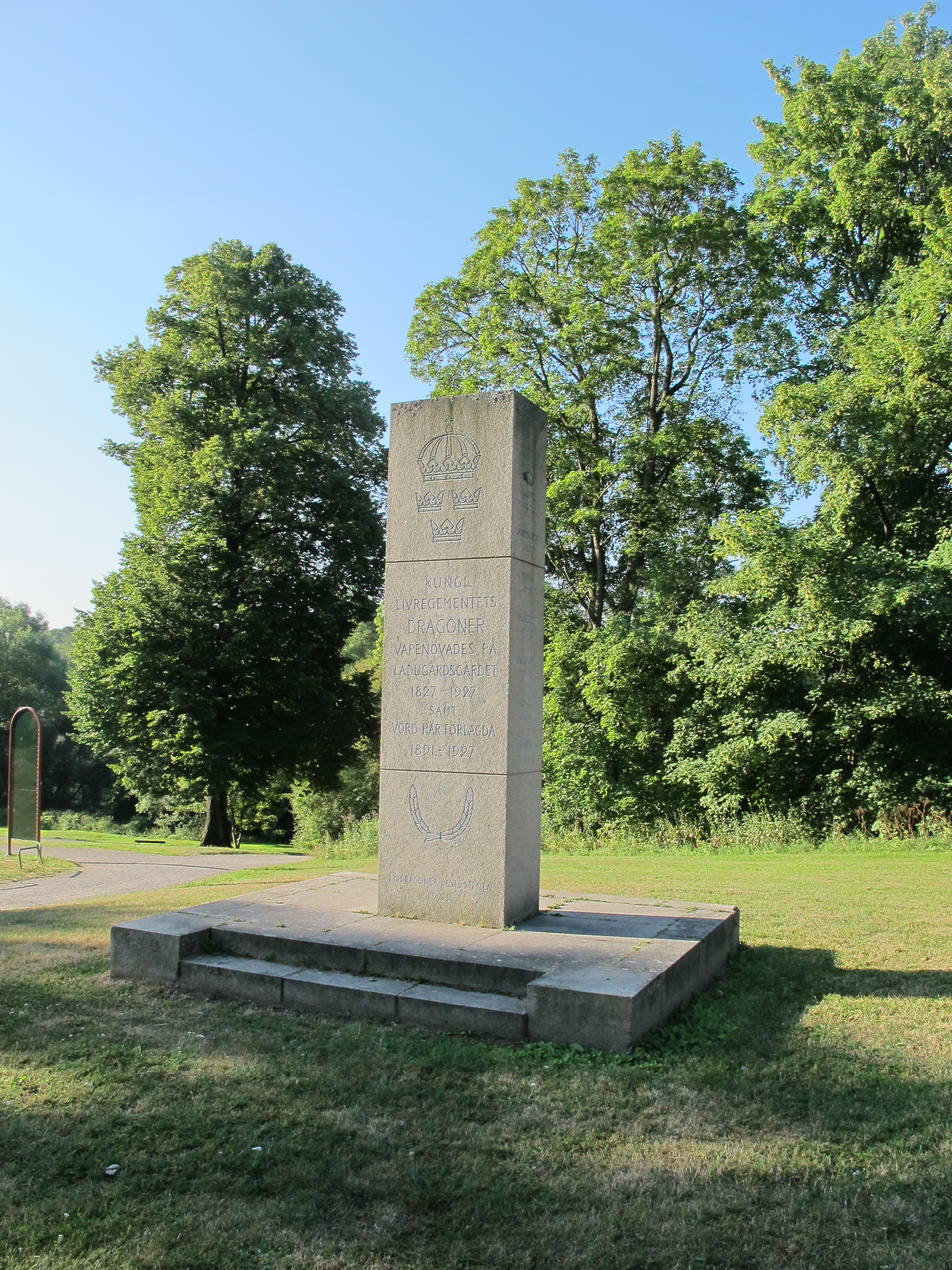 Livregementets dragoners minnessten vid Djurgårdsbrunnsviken